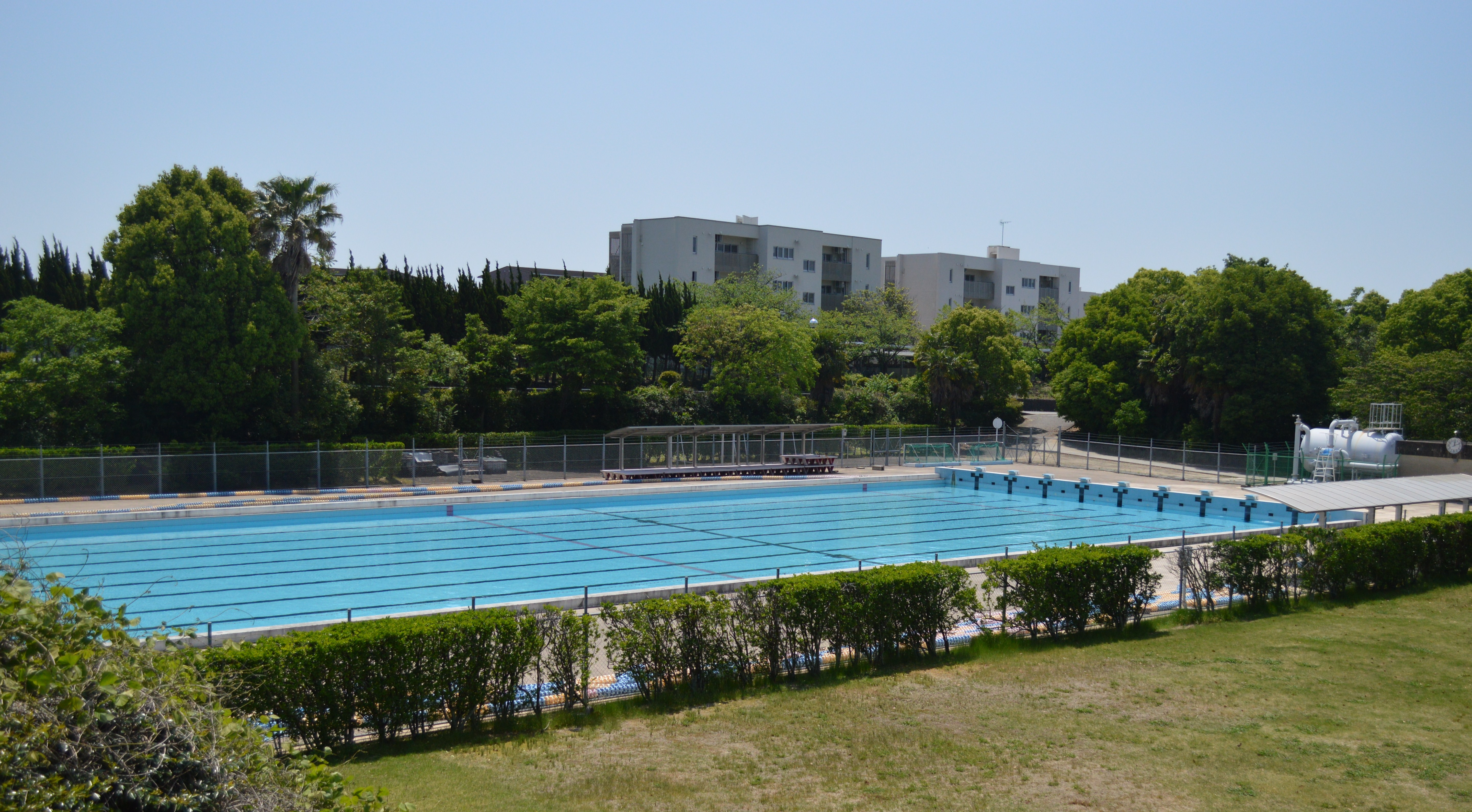 愛知教育大学のプール、愛知県刈谷市